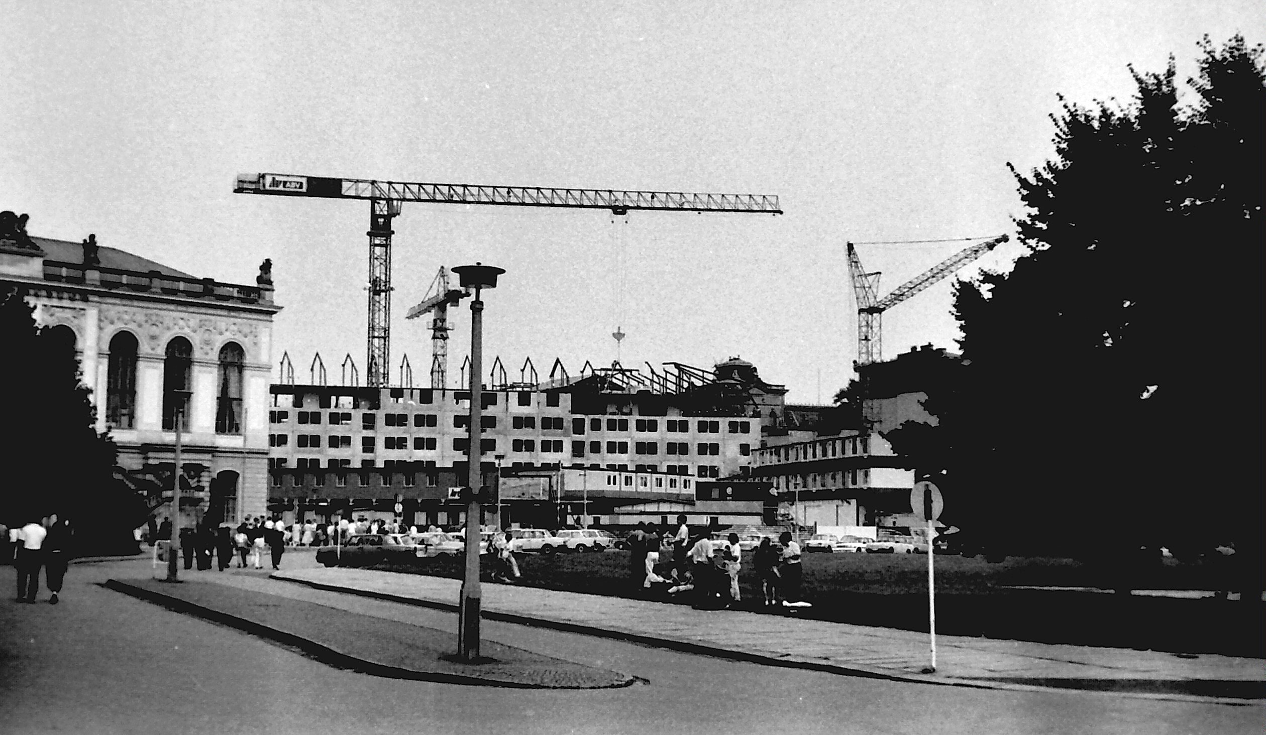 Blick vom Jüdenhof zur Baustelle des Hotels „Dresdner Hof“ (heute „Hilton Dresden“)